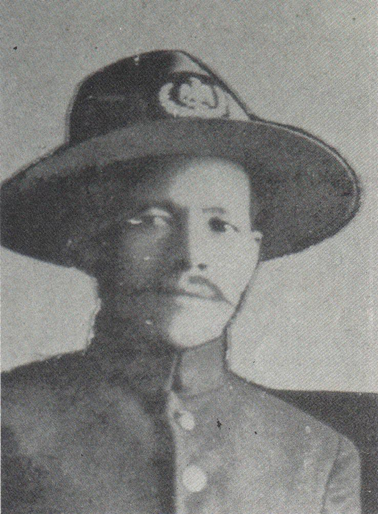 General Calixto Contreras